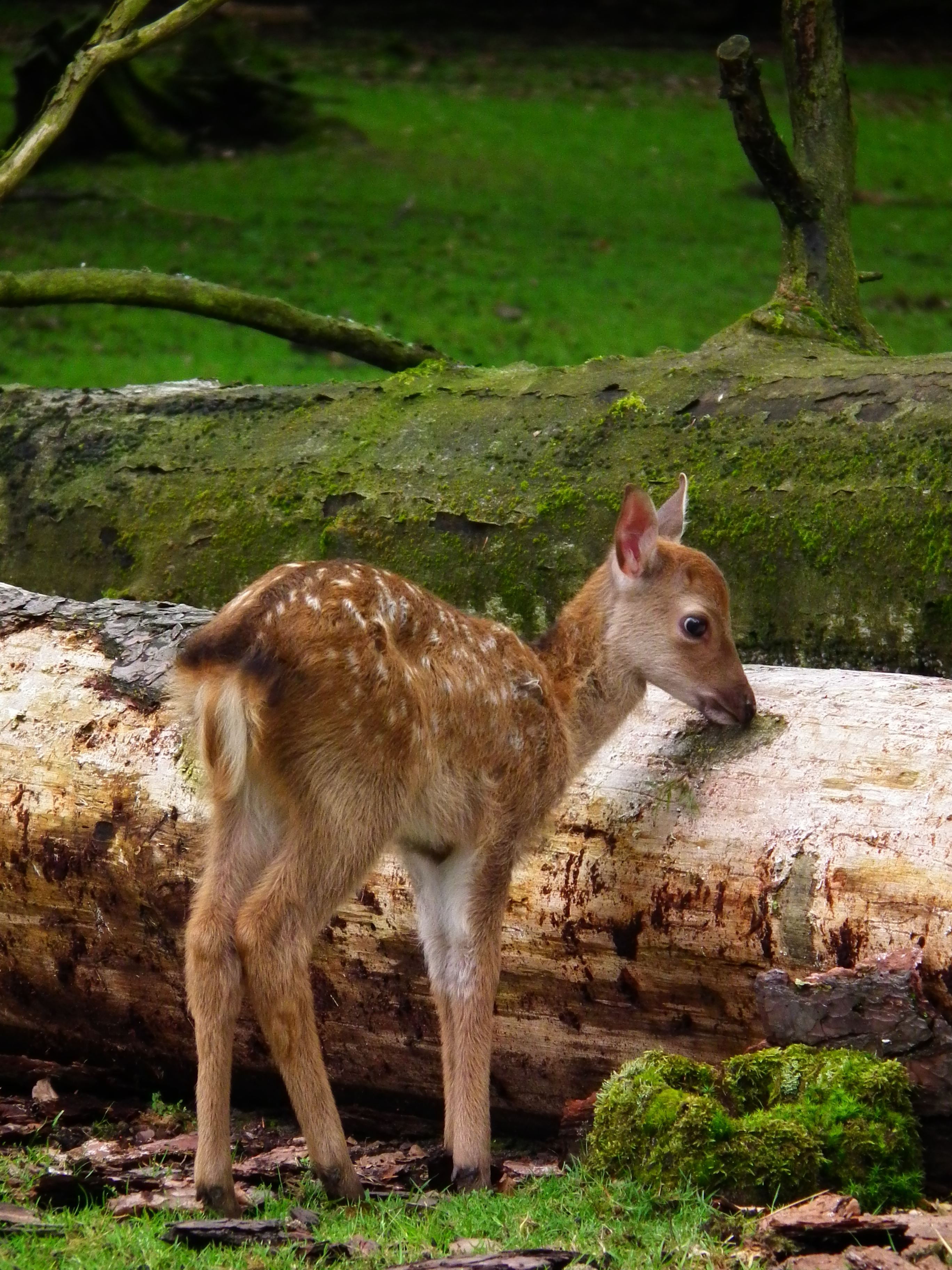 Kitz des Sikahirsch (Cervus nippon), aufgenommen im Wildpark Alte Fasanerie in Klein-Auheim (Hessen, Deutschland)